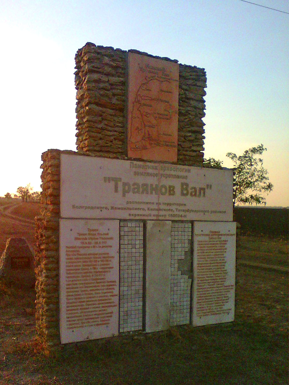 Земляне укріплення «Траянів вал», Одеська область, на території Болградського, Ізмаїльського, Кілійського, Татарбунарського районів